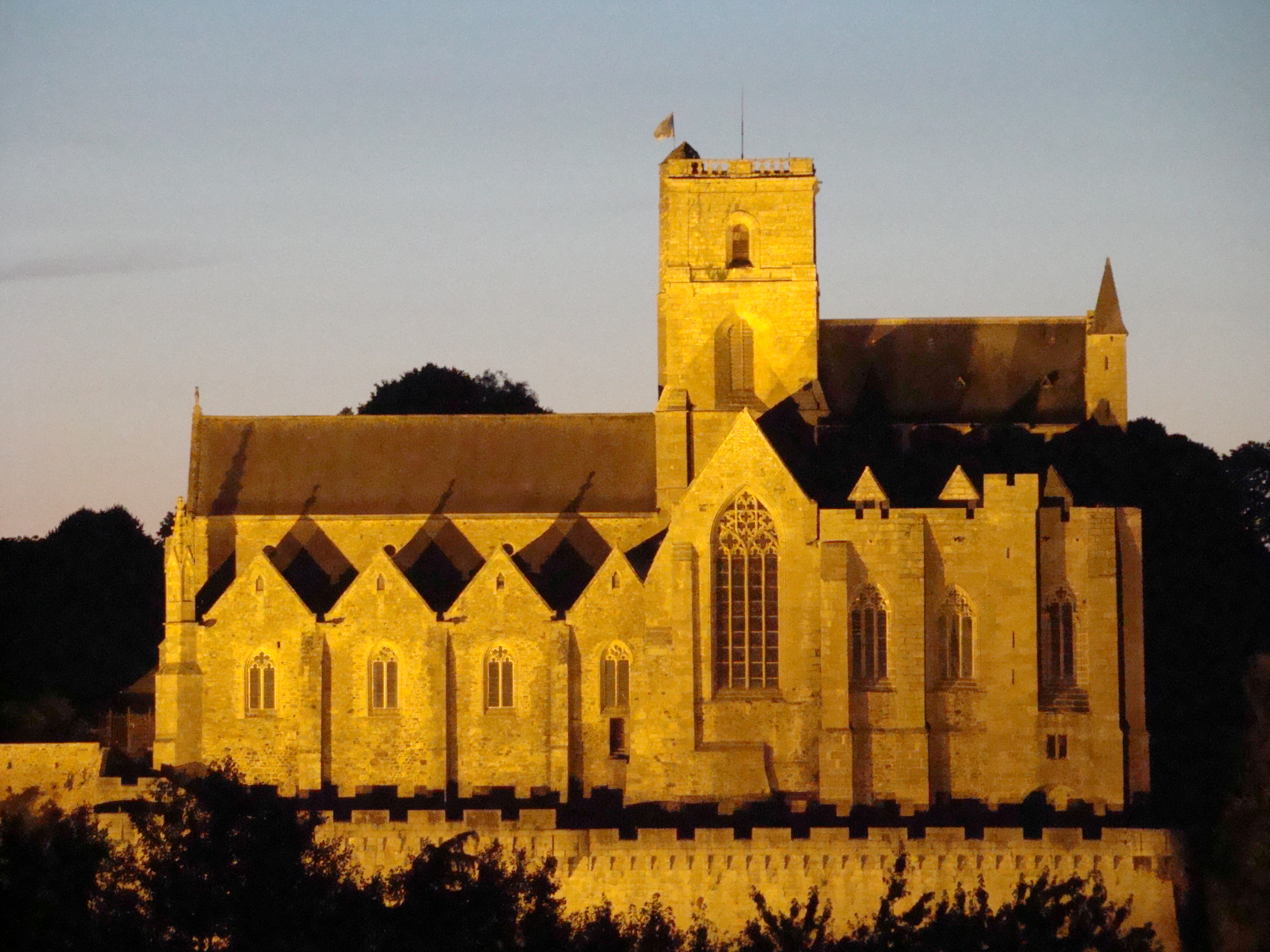 Collégiale de Lamballe (22) .